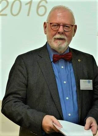 Der Mineraloge Robert B. Heimann bei der Feier der Goldenen Promotion an der Freien Universität Berlin.